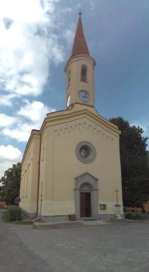 kostel Povýšení svatého Kříže v Petrovicích